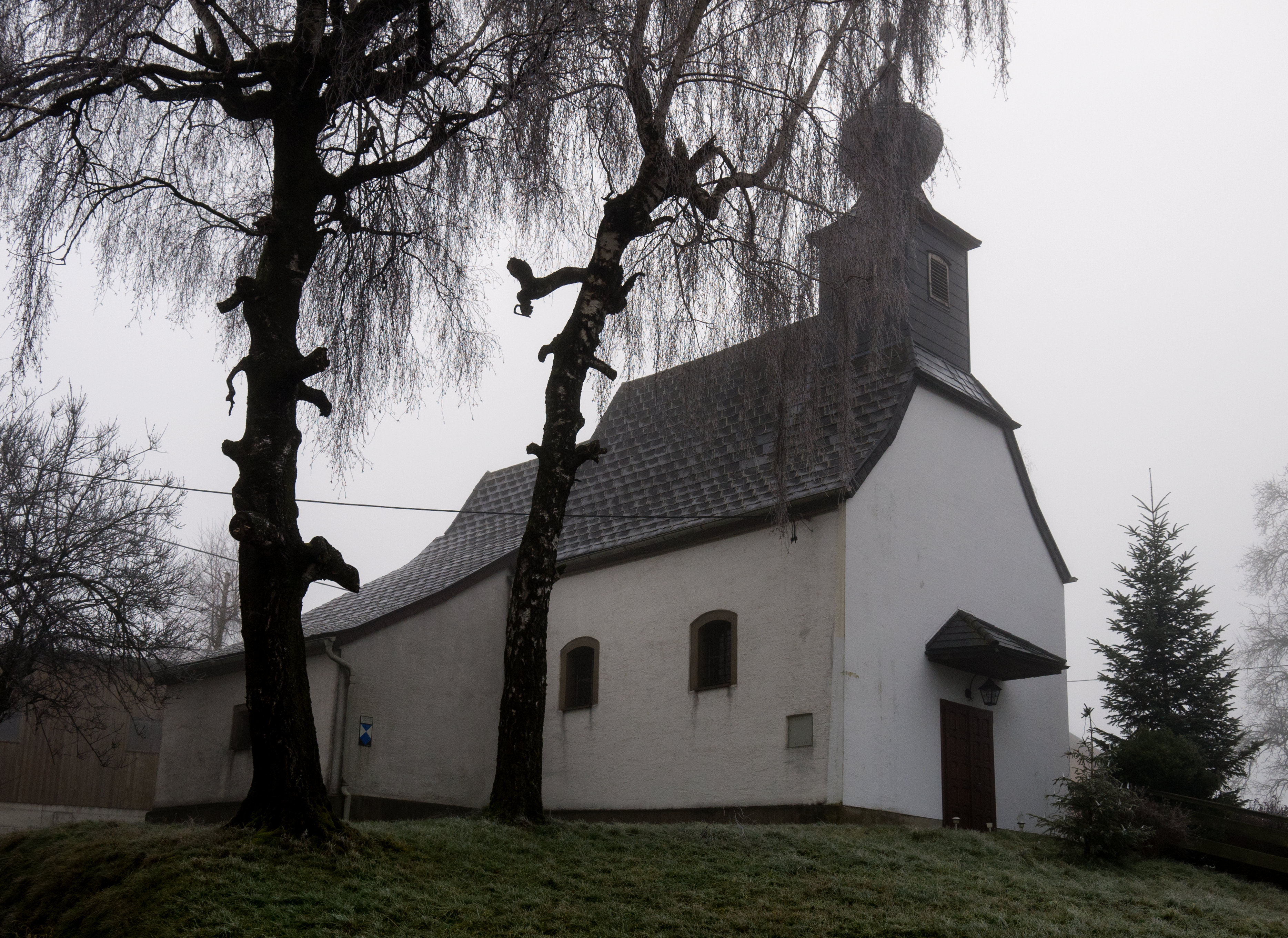 Kath. Filialkirche hl. Erasmus und ehem. Friedhofsfläche